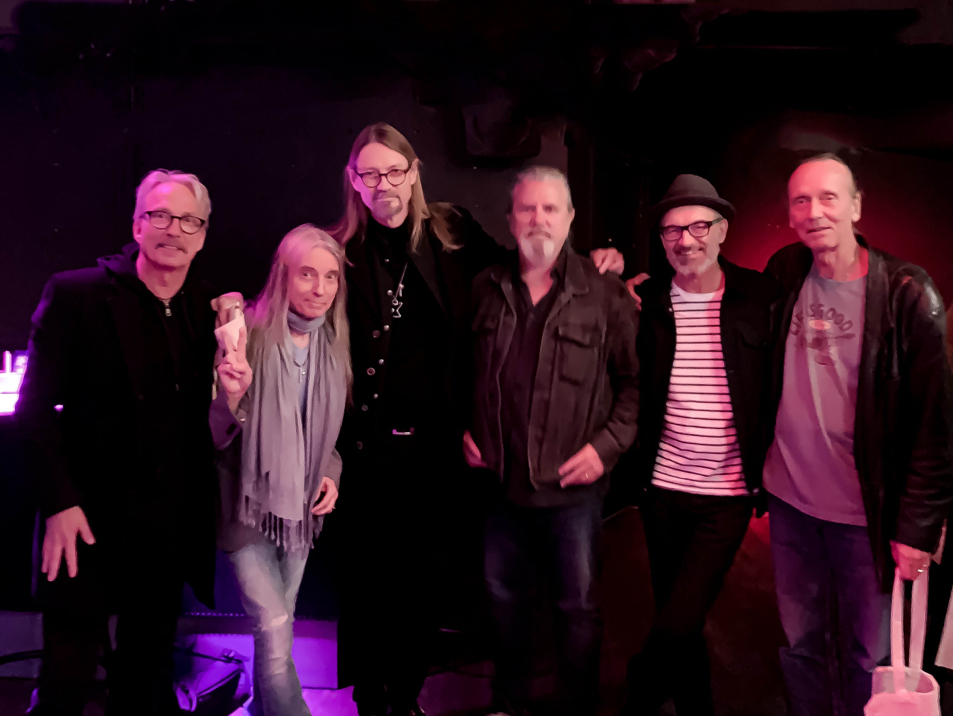 Dan Hylander och Raj Montana Band 2019, releasefest för ny singel.